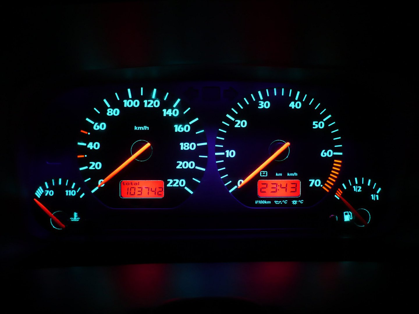 Mittels EL-Folie leuchtende Tachoscheiben eines Volkswagen Golf 3 (Zeiger sind zusätzlich mit UV-Licht von UV-LEDs beleuchtet).